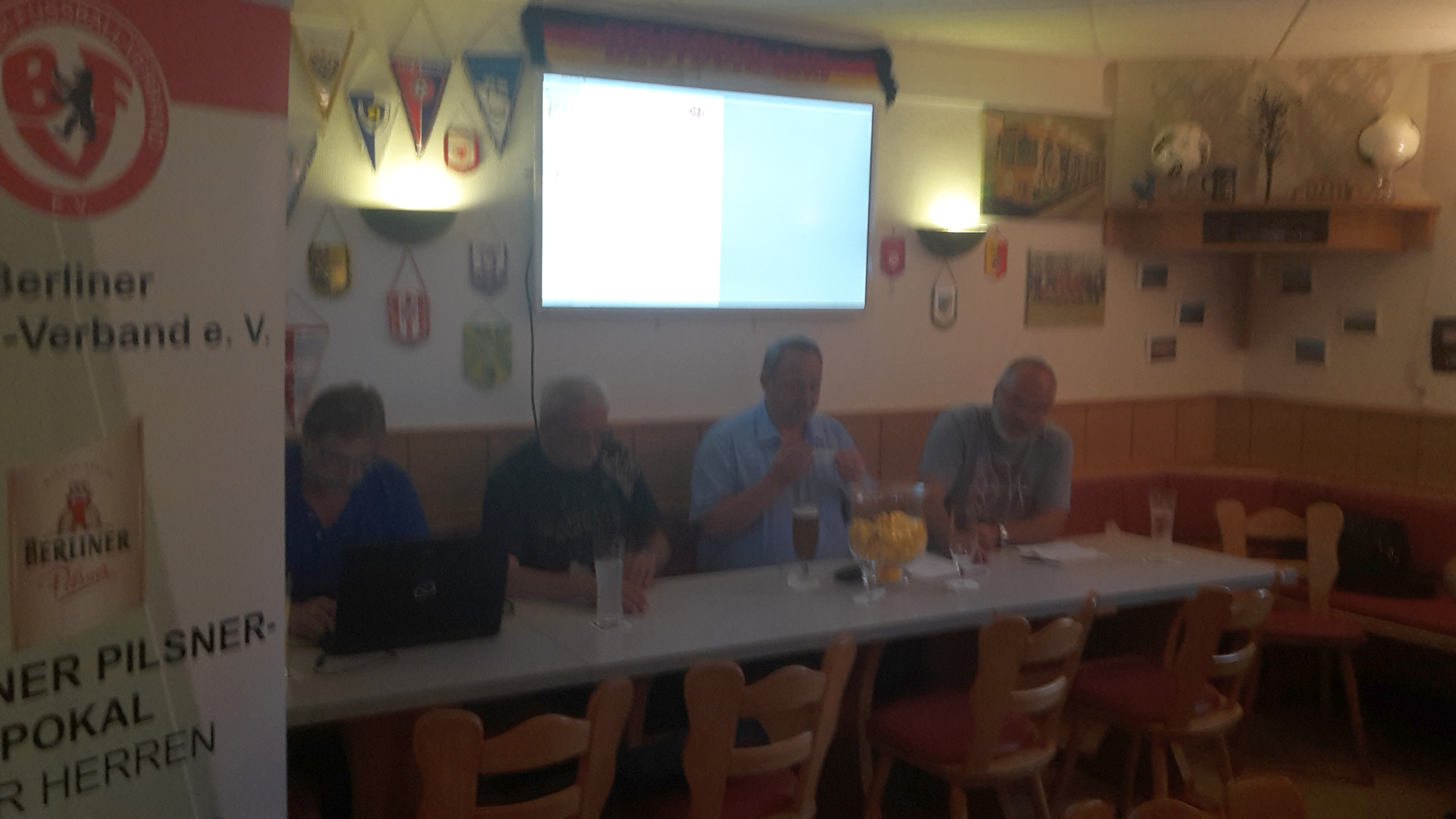 Auslosung zur 2. Runde des Berliner Pilsner Pokals im Kasino des "Haus des Fussballs" des Berliner Fußball-Verbands in der Humboldstraße in Berlin-Grunewald.